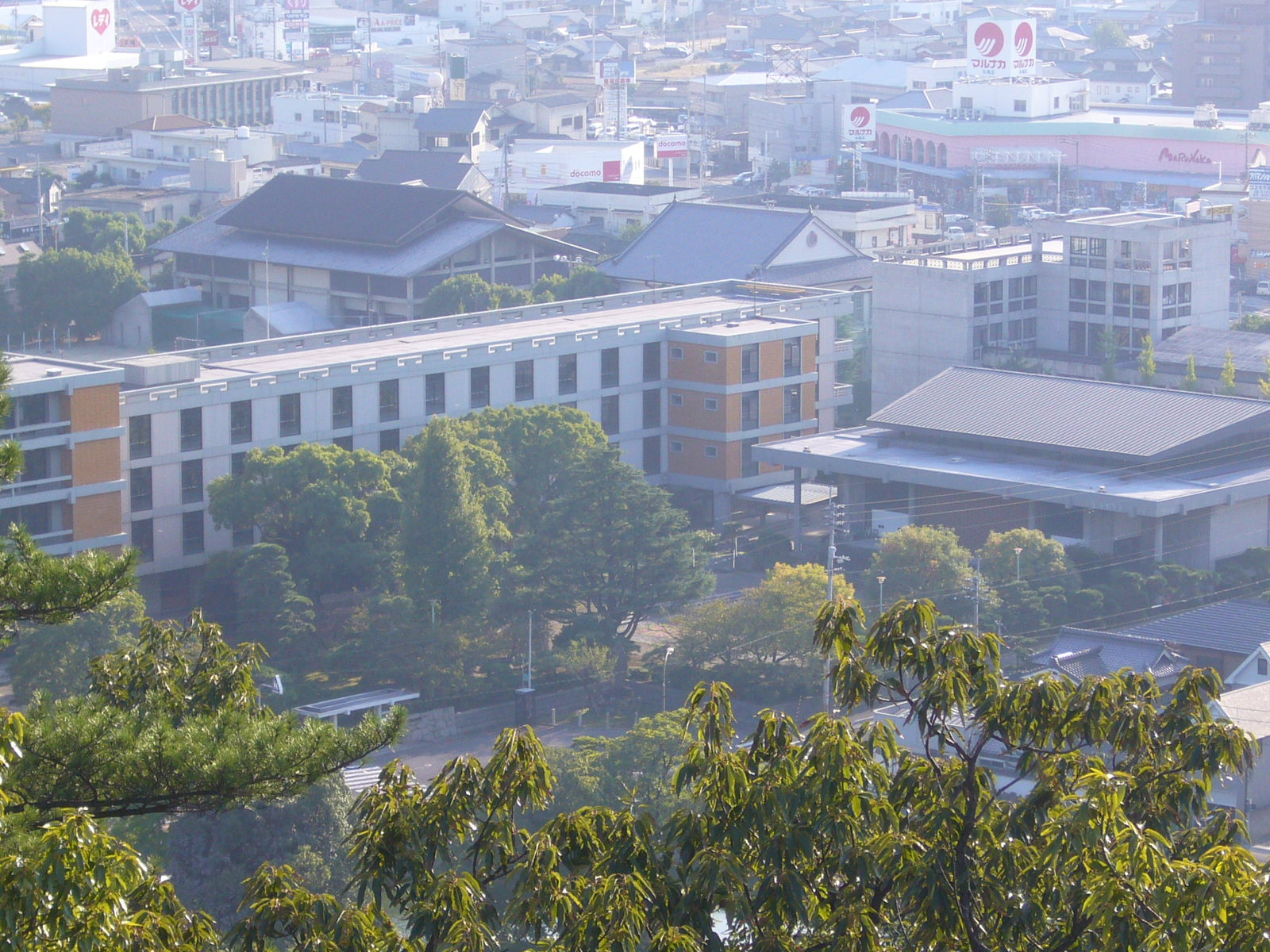 丸亀高等学校概観